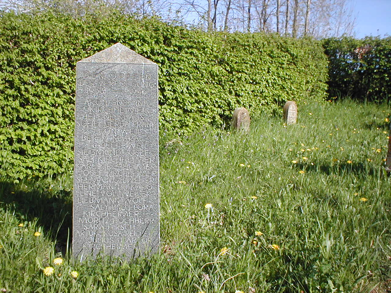 Gedenkstein für die jüdischen Opfer der NS-Zeit auf dem Judenfriedhof in Kirchardt-Berwangen